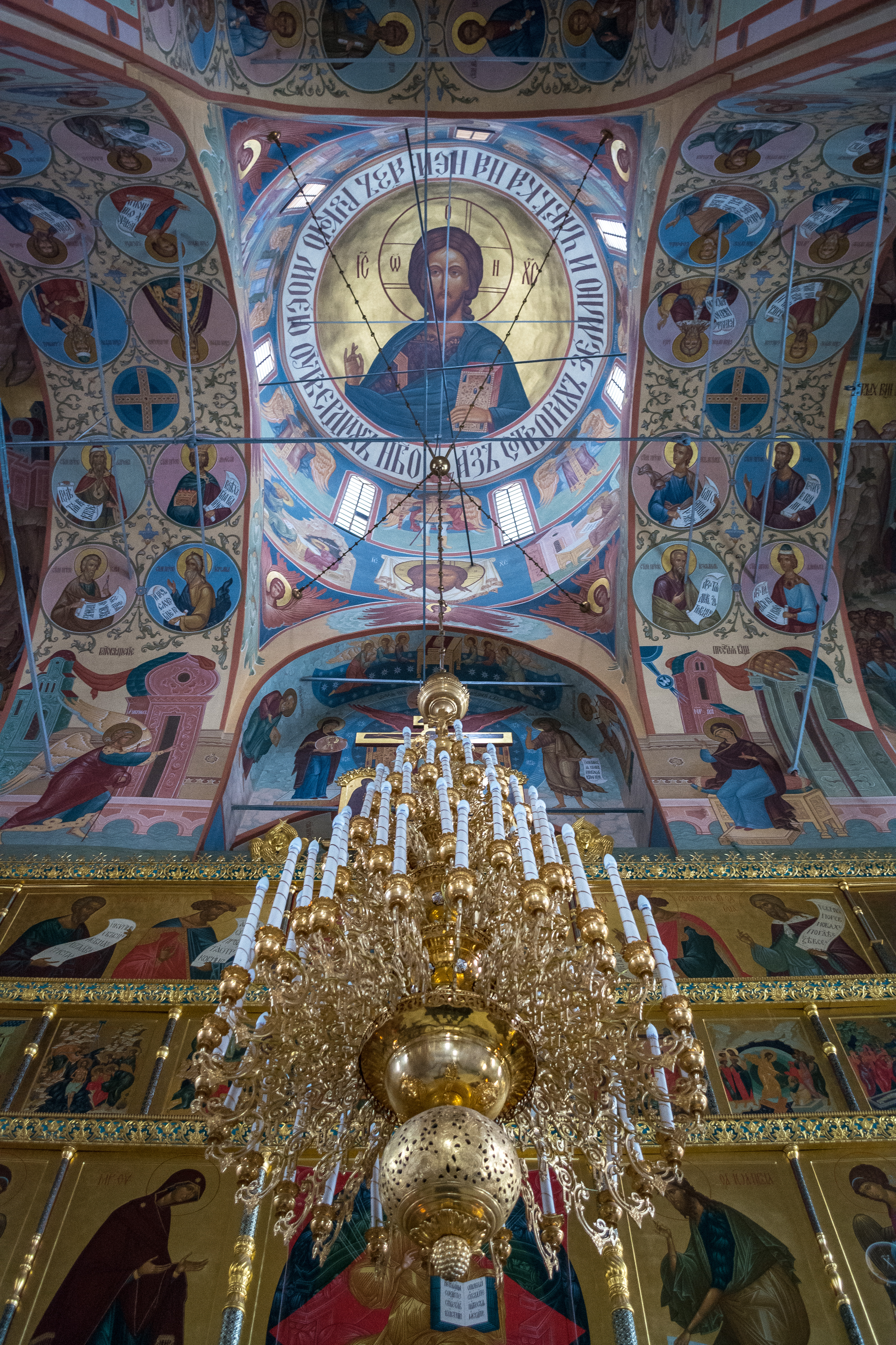 Софийско-Успенский собор: площадь Красная, 2, строение 22, Тобольск, Тюменская область